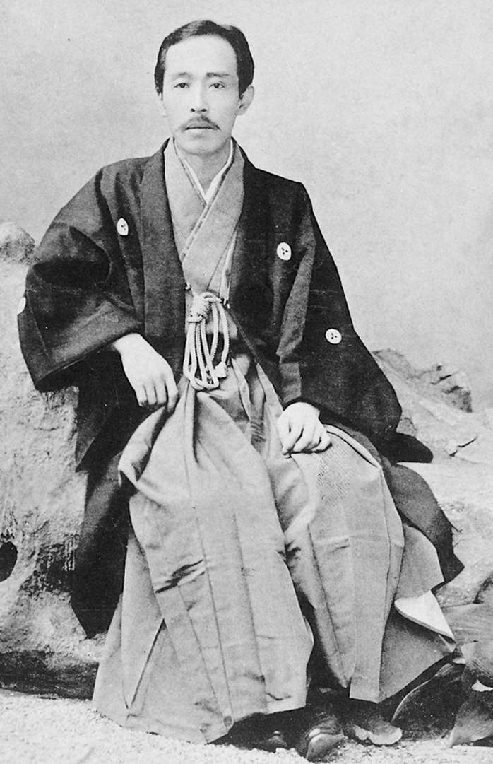 高橋健三 / Kenzō Takahashi (1855–98)